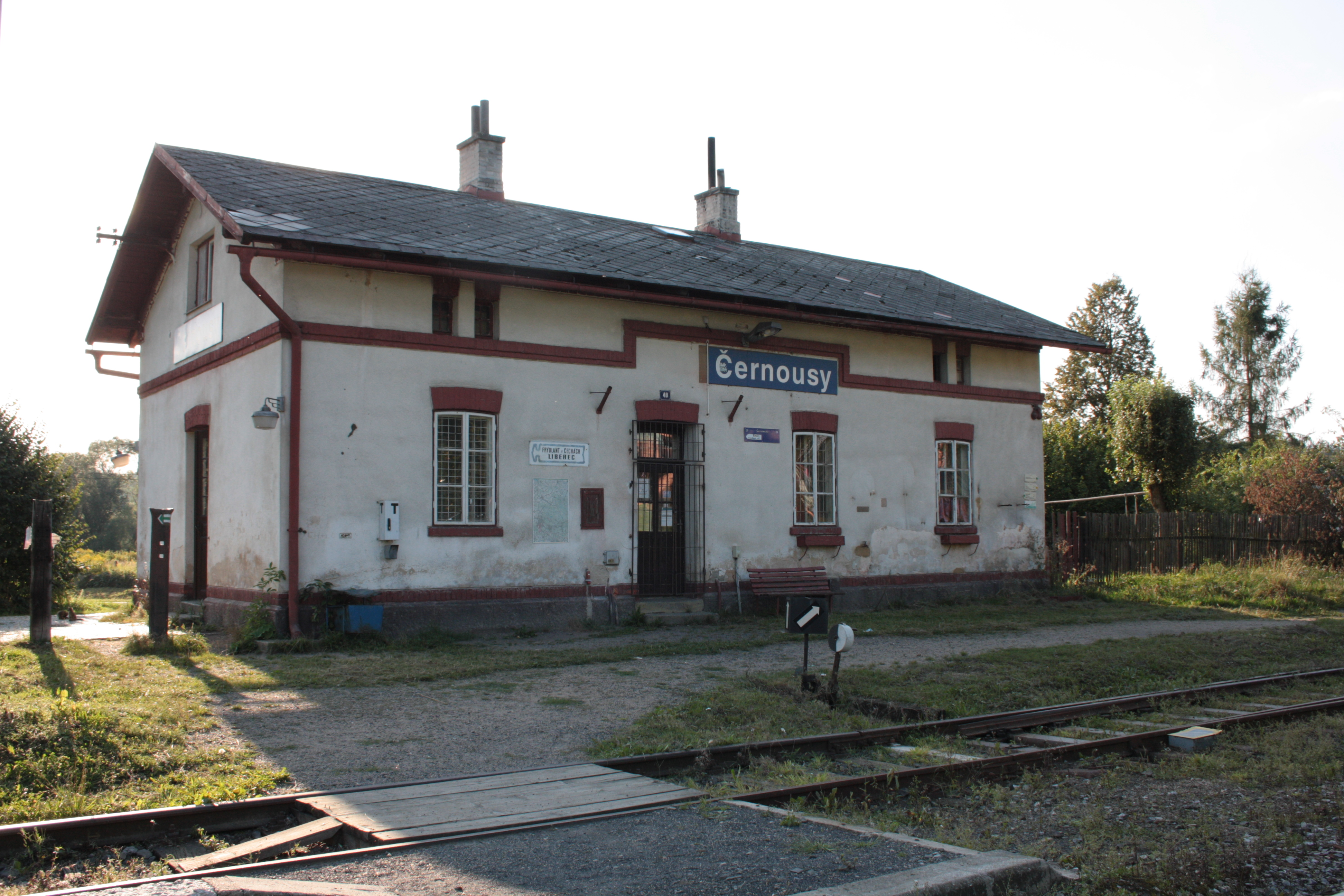 This photograph was taken with a DSLR from WMCZ's Camera grant. Staniční budova železniční zastávky Černousy (pohled od východu).